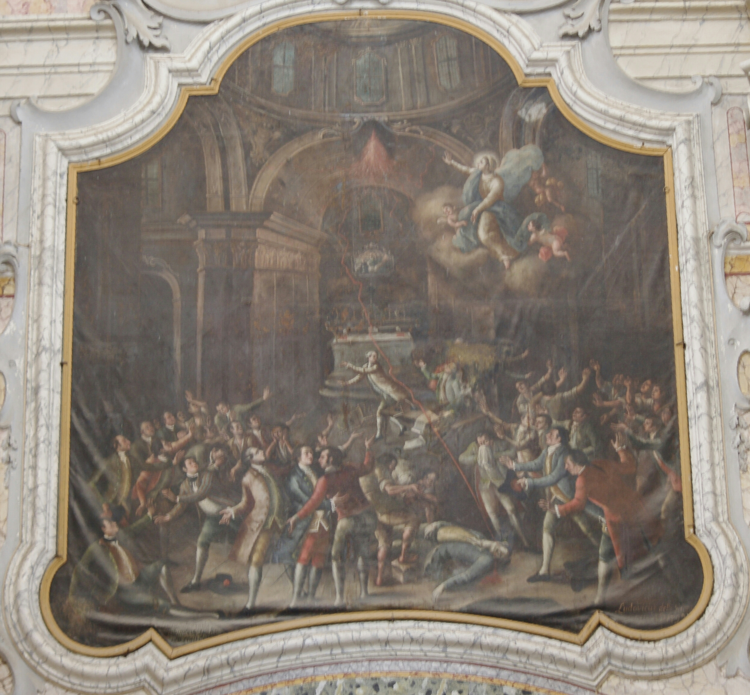 Tela nella chiesa matrice di Francavilla Fontana